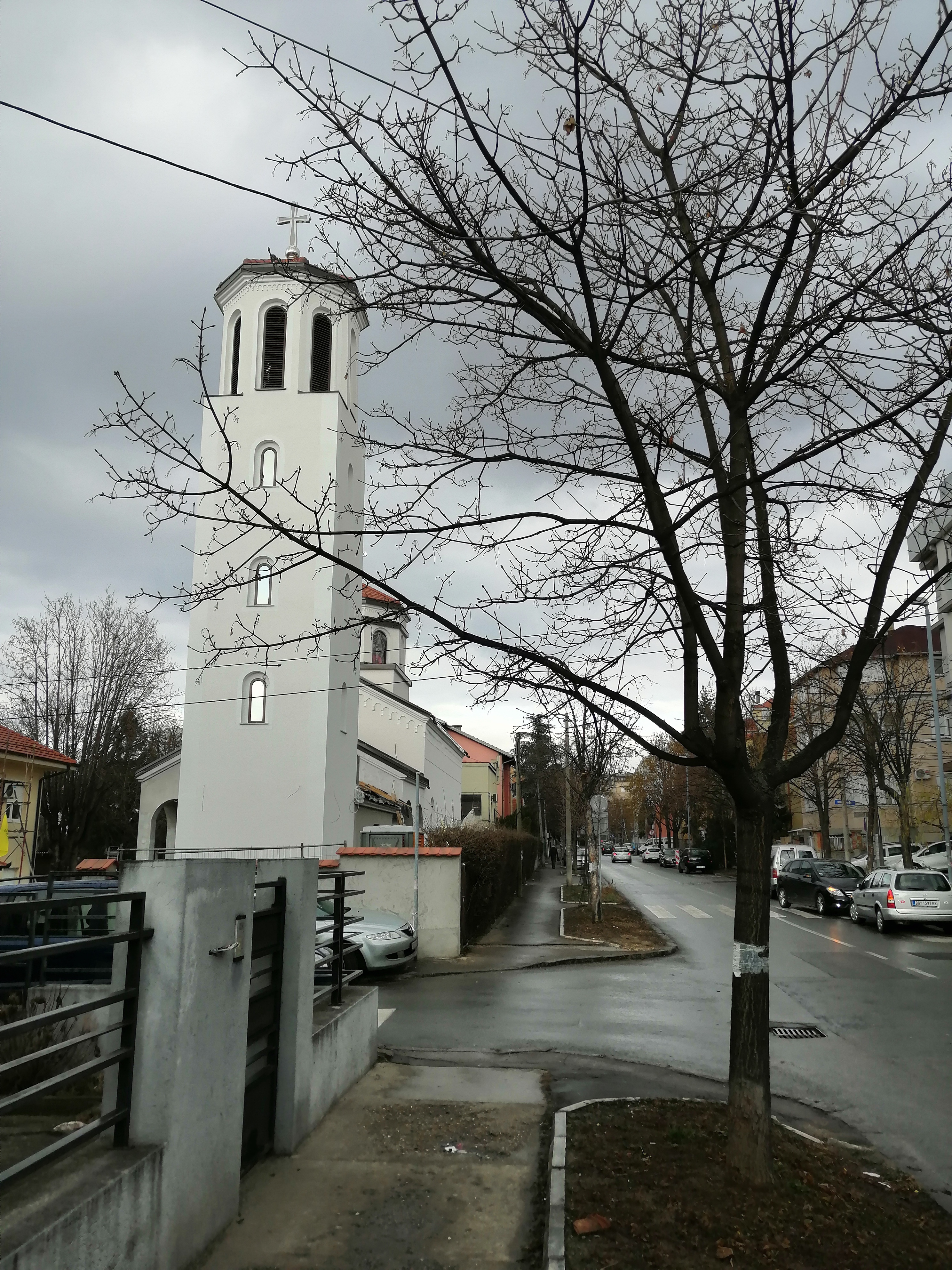 Srpski (latinica): Crkva Svete Trojice u Beogradu